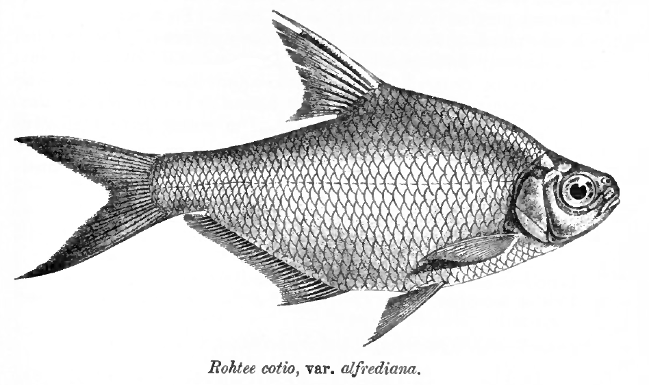 Rohtee cotio var. alfrediana = Osteobrama alfredianus (Valenciennes, 1844)